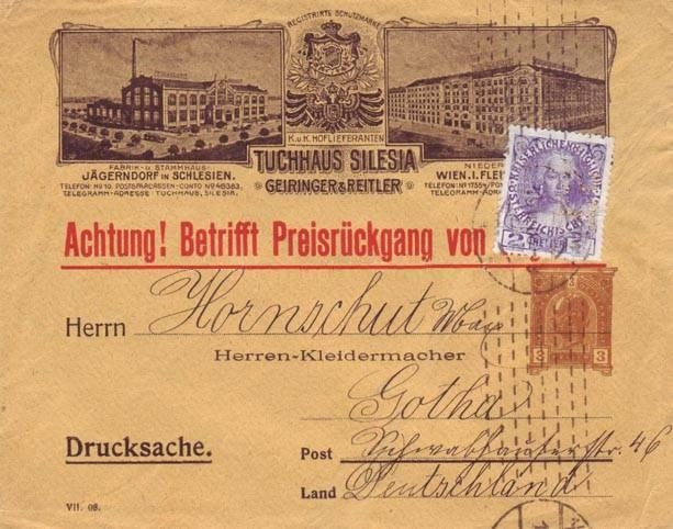 Faktura des Tuchhauses „Silesia“ von Geiringer & Reitler